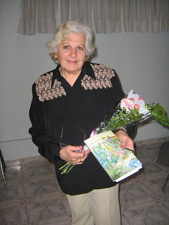 Presentando el libro En este transcurrir